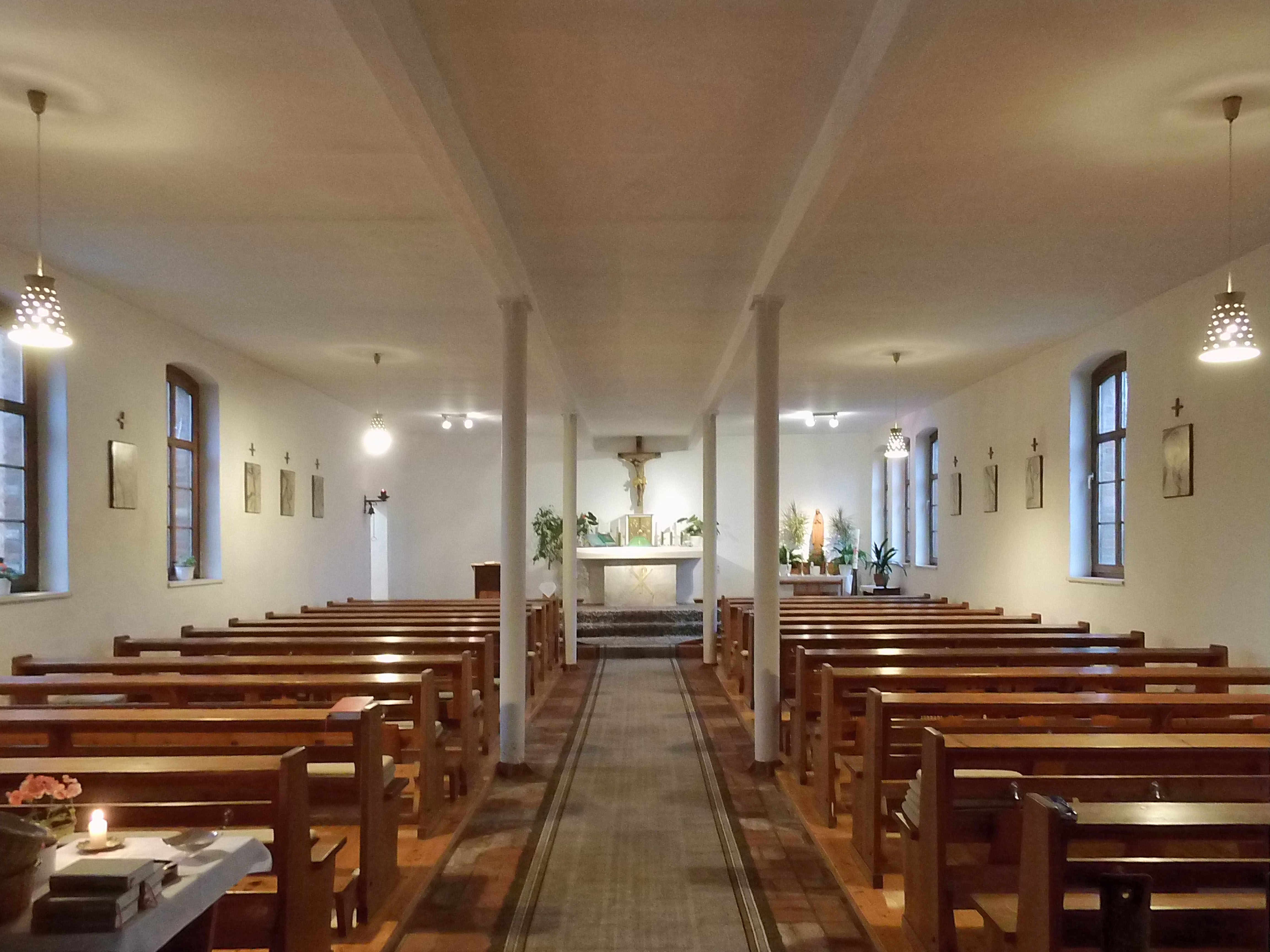 Katholische Kirche St. Johannes Baptist in Ottleben.